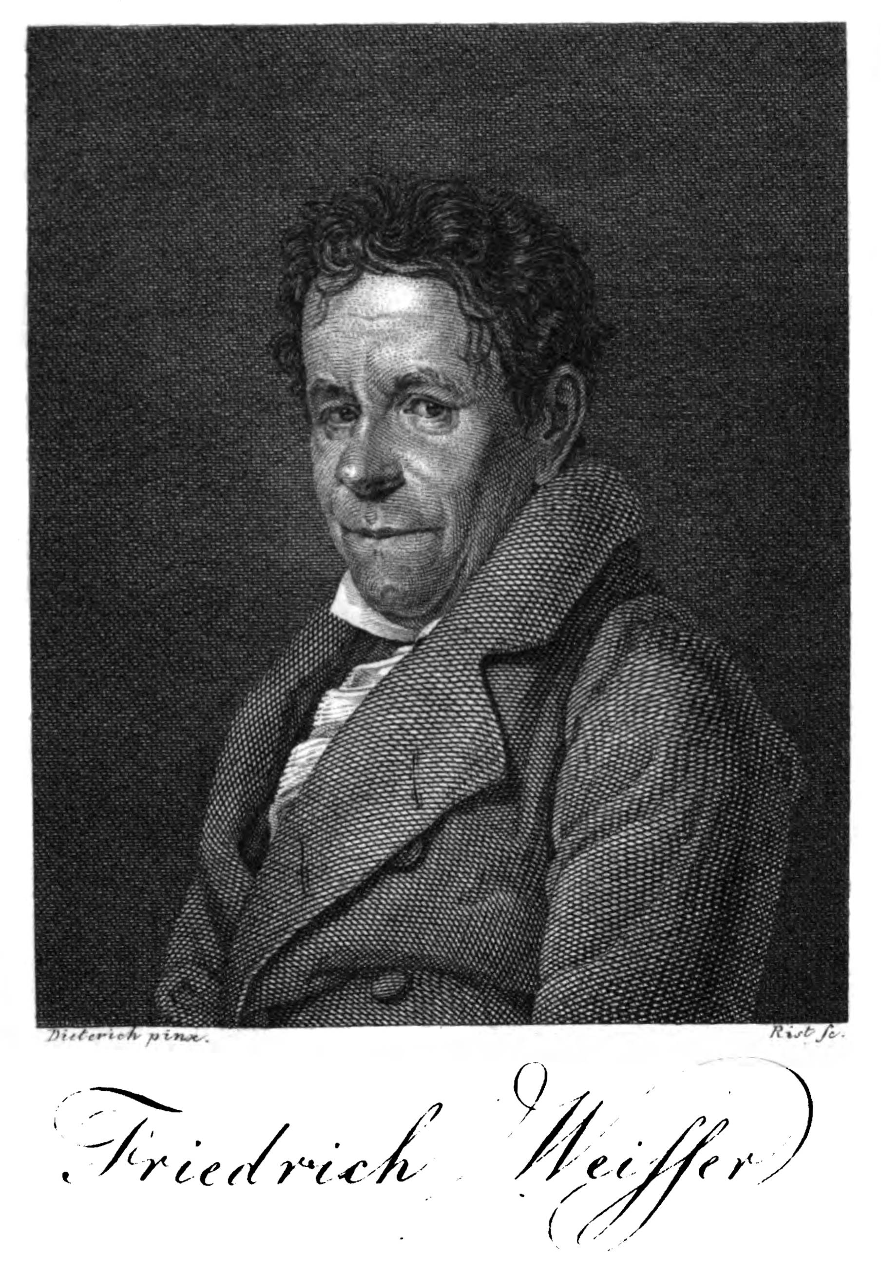 Friedrich Christoph Weisser (7. März 1761 in Stuttgart; – 9. Januar 1836 Stuttgart) deutscher Schriftsteller. Titelbild in: Friedrich Weisser’s sämmtliche prosaische Werke. Zweyte wohlfeilere Ausgabe. J. B. Metzler’sche Buchhandlung, Stuttgart 1822, Erster Theil. Mit dem Bildniß des Verfassers